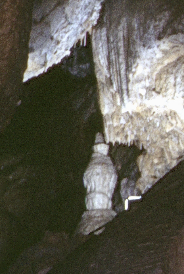 Eberstadter Tropfsteinhöhle: 'Weiße Frau', ein Tropfstein benannt nach einer Sagengestalt, die im Eberstadter Schloß spuken soll.